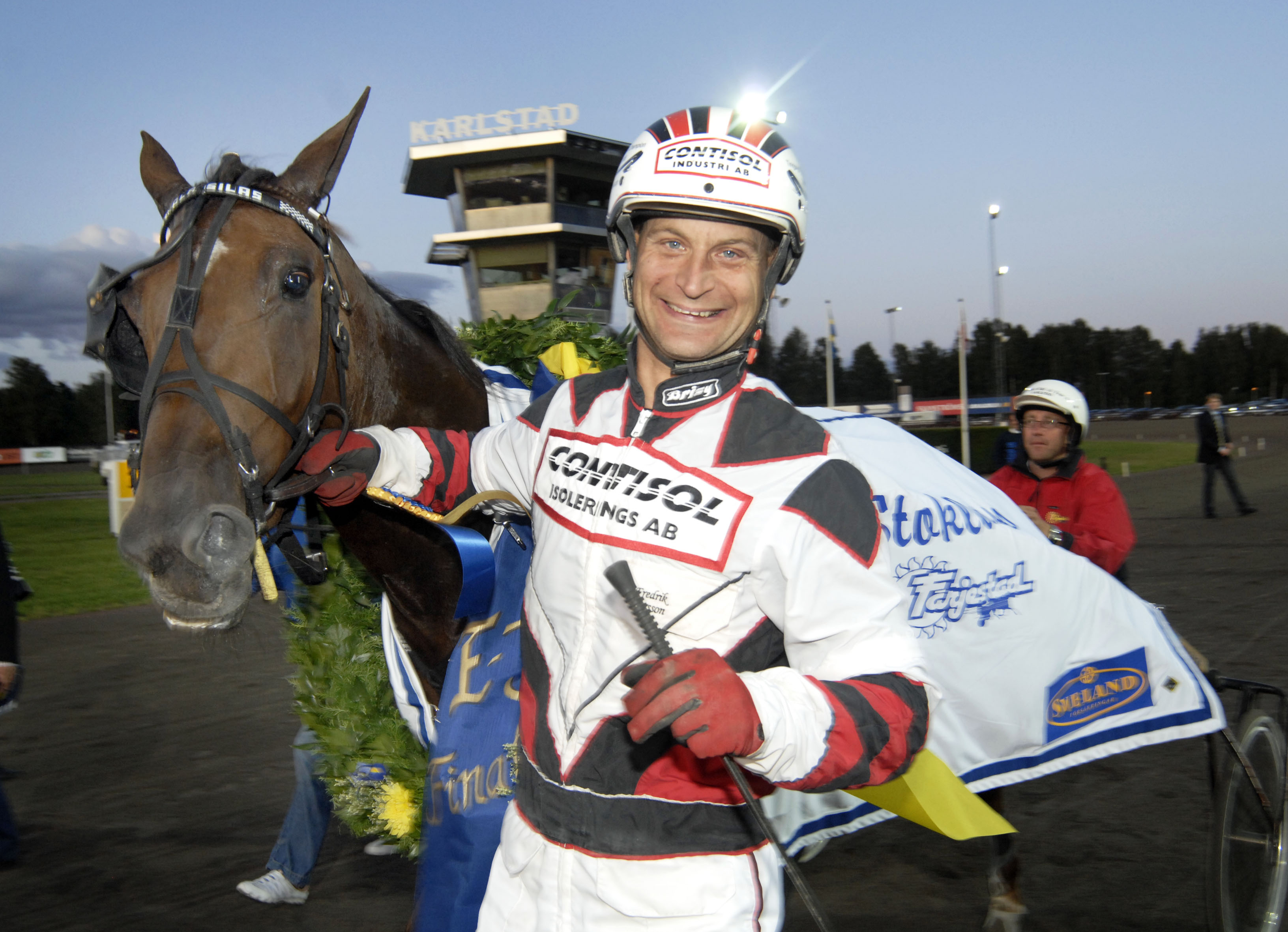 Fredrik Persson Viola Silas